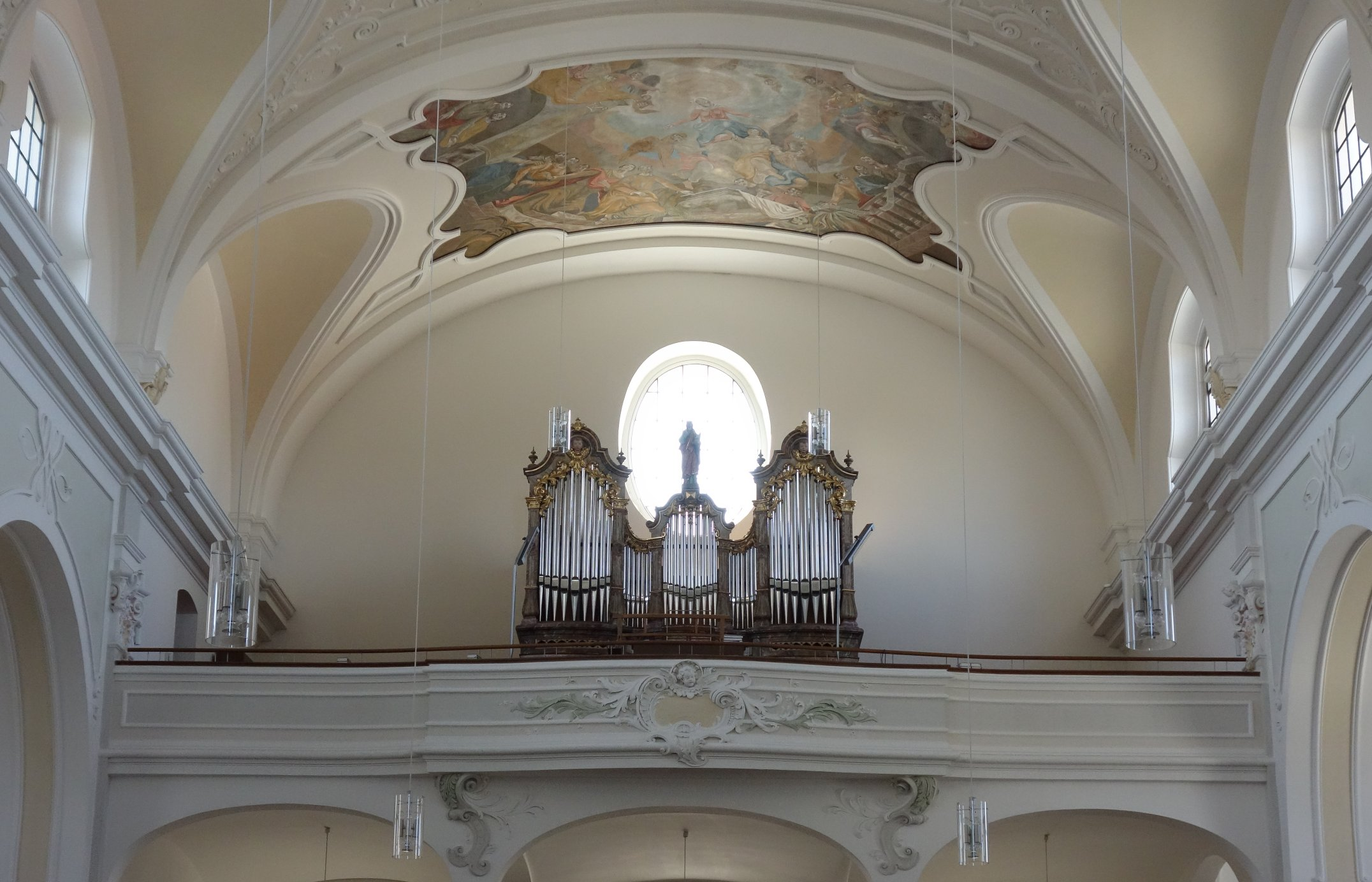 Orgel von St. Georg in Hohenwart (1903, W. Siemann op. 121, II/21)